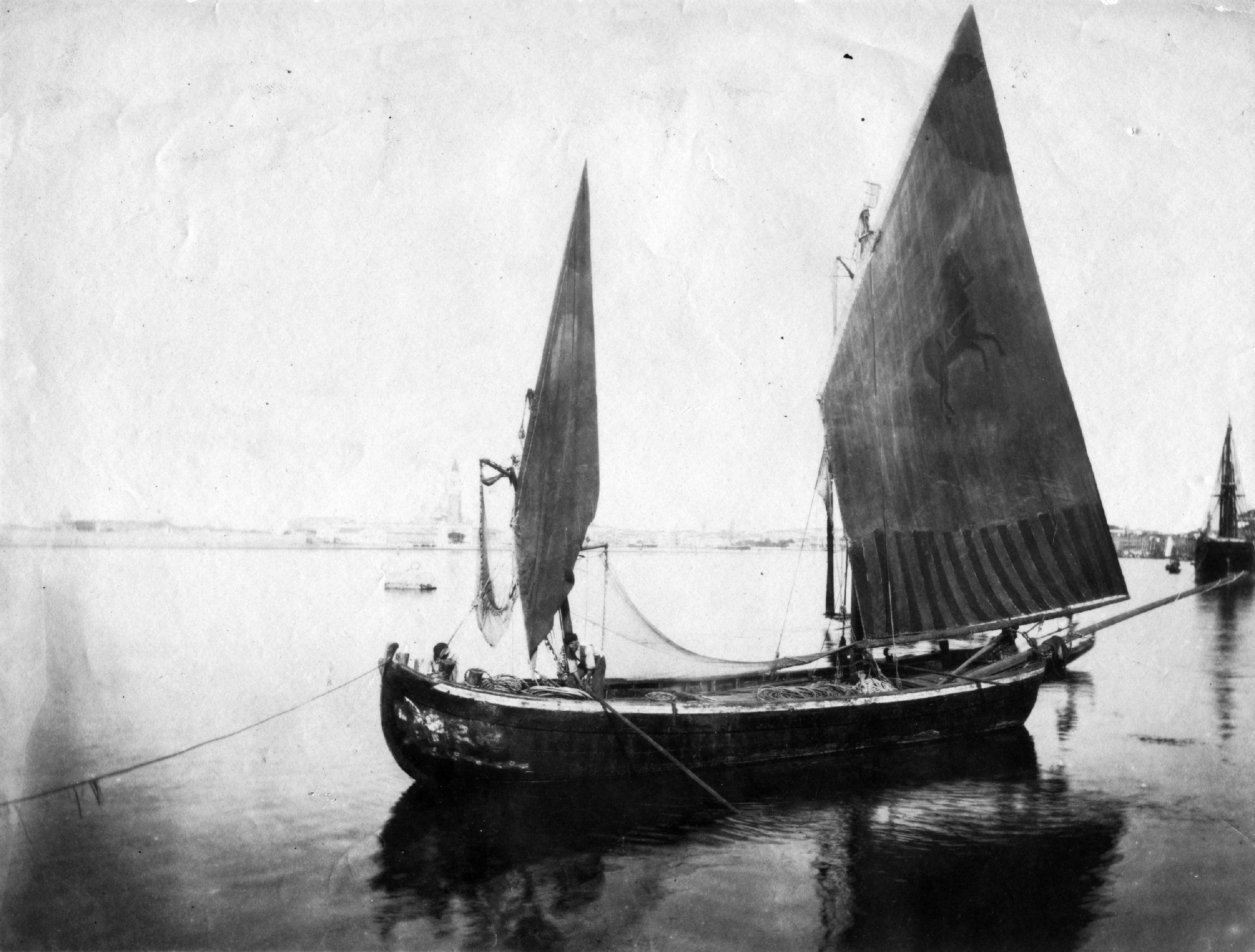 a város látképe a San Servolo sziget felől.View from San Servolo island. Location: Italy, Venice Tags: sailboat Title: a város látképe a San Servolo sziget felől.